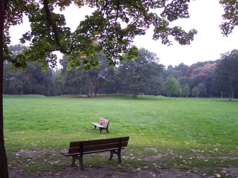 Dortmund Volksgarten Mengede